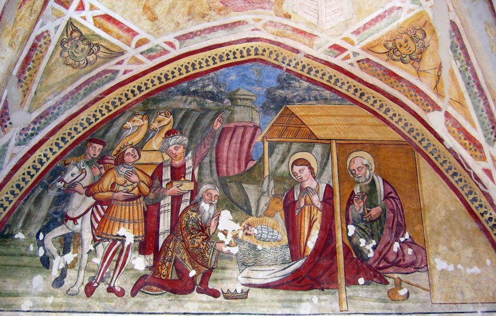 Chiesa di San Pelagio di Tricesimo (Udine). Affreschi realizzati da Gian Paolo Thanner nel 1535. Natività, parete nord del presbiterio.